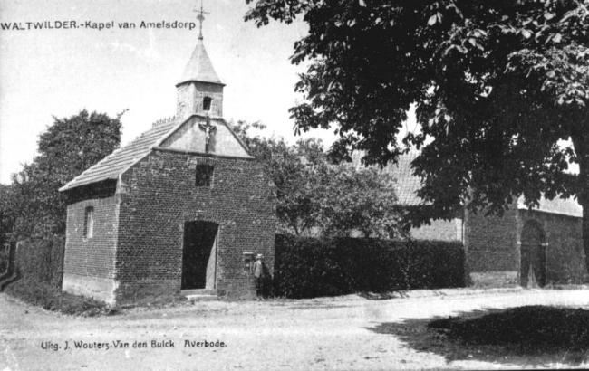 Oude prentbriefkaartuit begin 1900. De kaart toont de afgebroken kapel in Amelsdorp een gehucht nabij Waltwilder